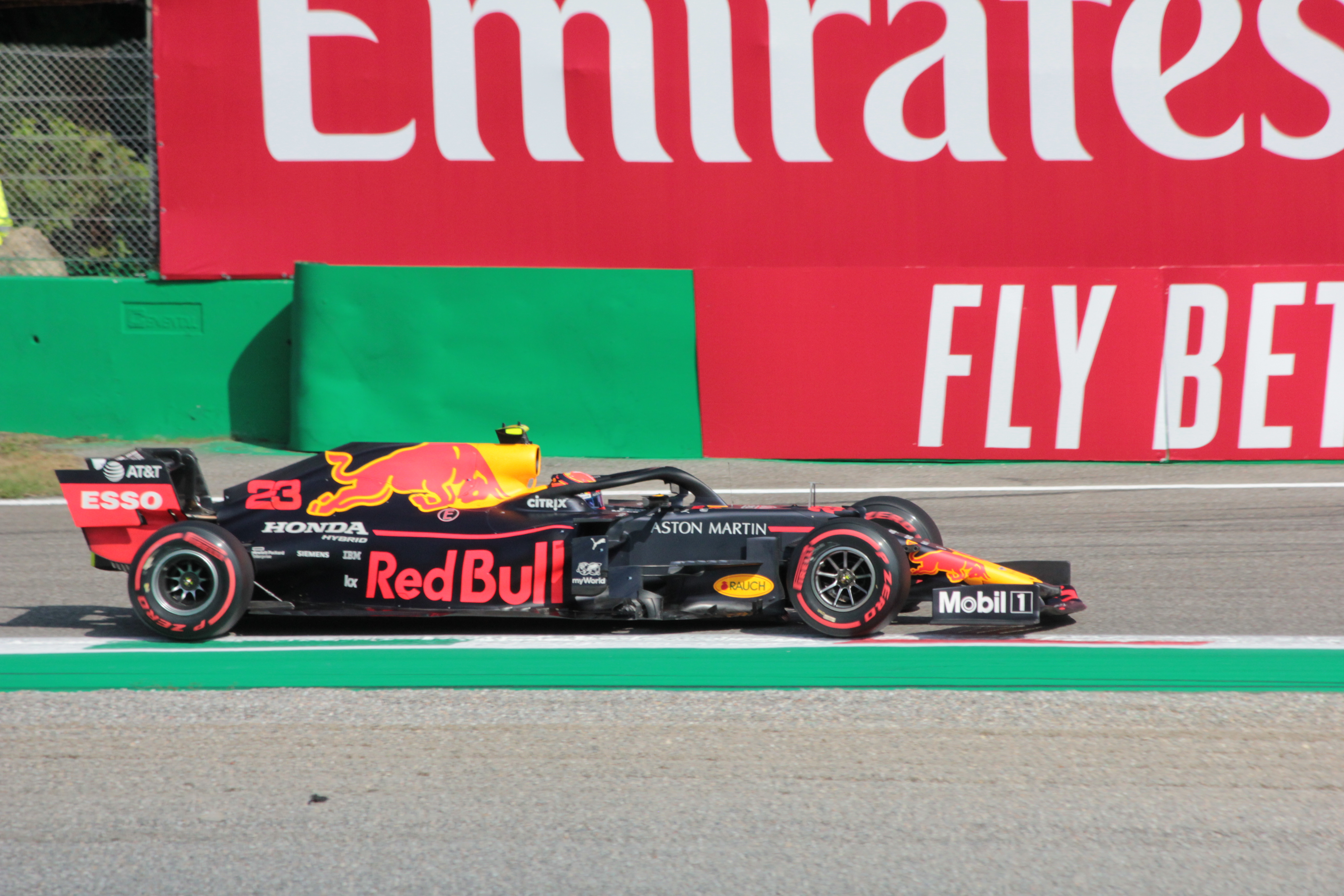 Alexander Albon durante le qualifiche del Gran Premio d'Italia 2019